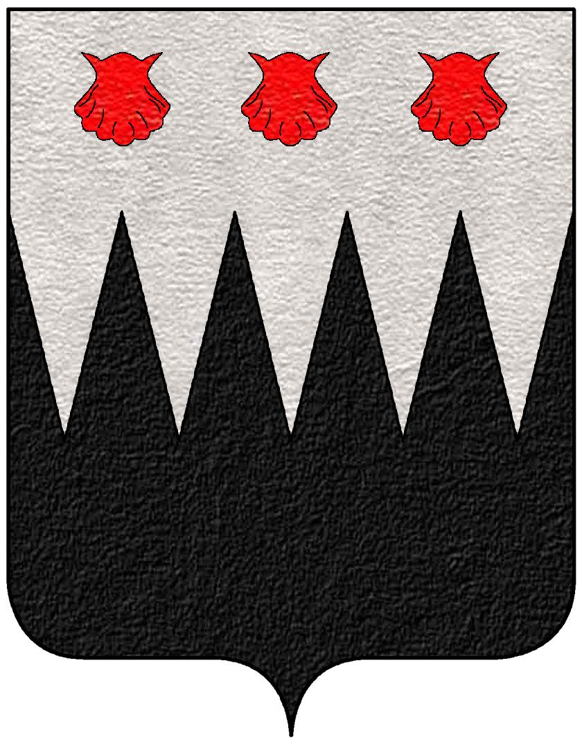 Stemma della famiglia Ruffo di Calabria